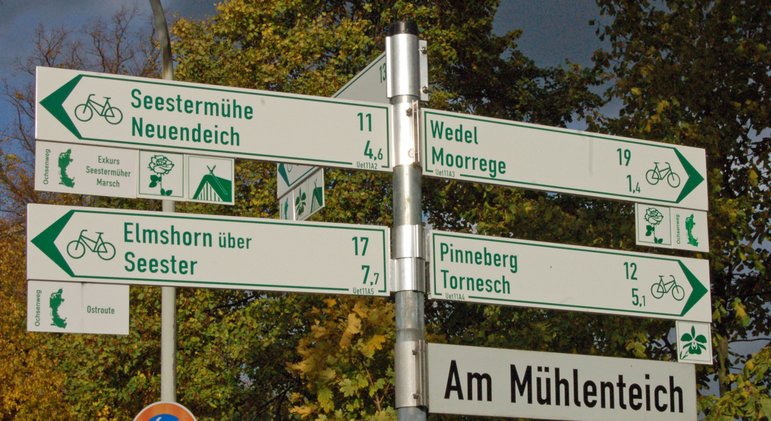 Übersicht der Radwanderwege in Uetersen